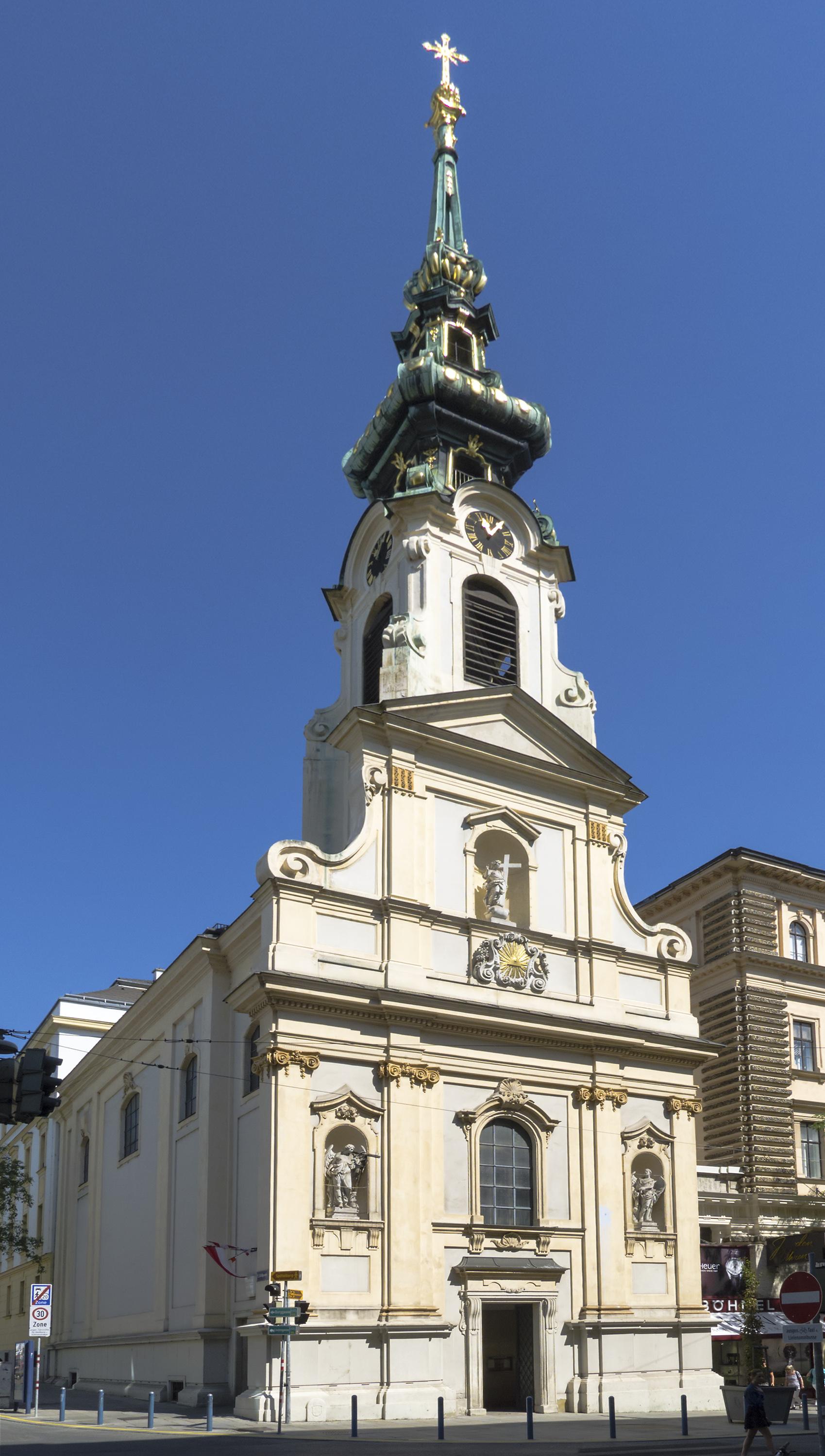 Stiftskirche in Wien 7, Mariahilfer Straße 26